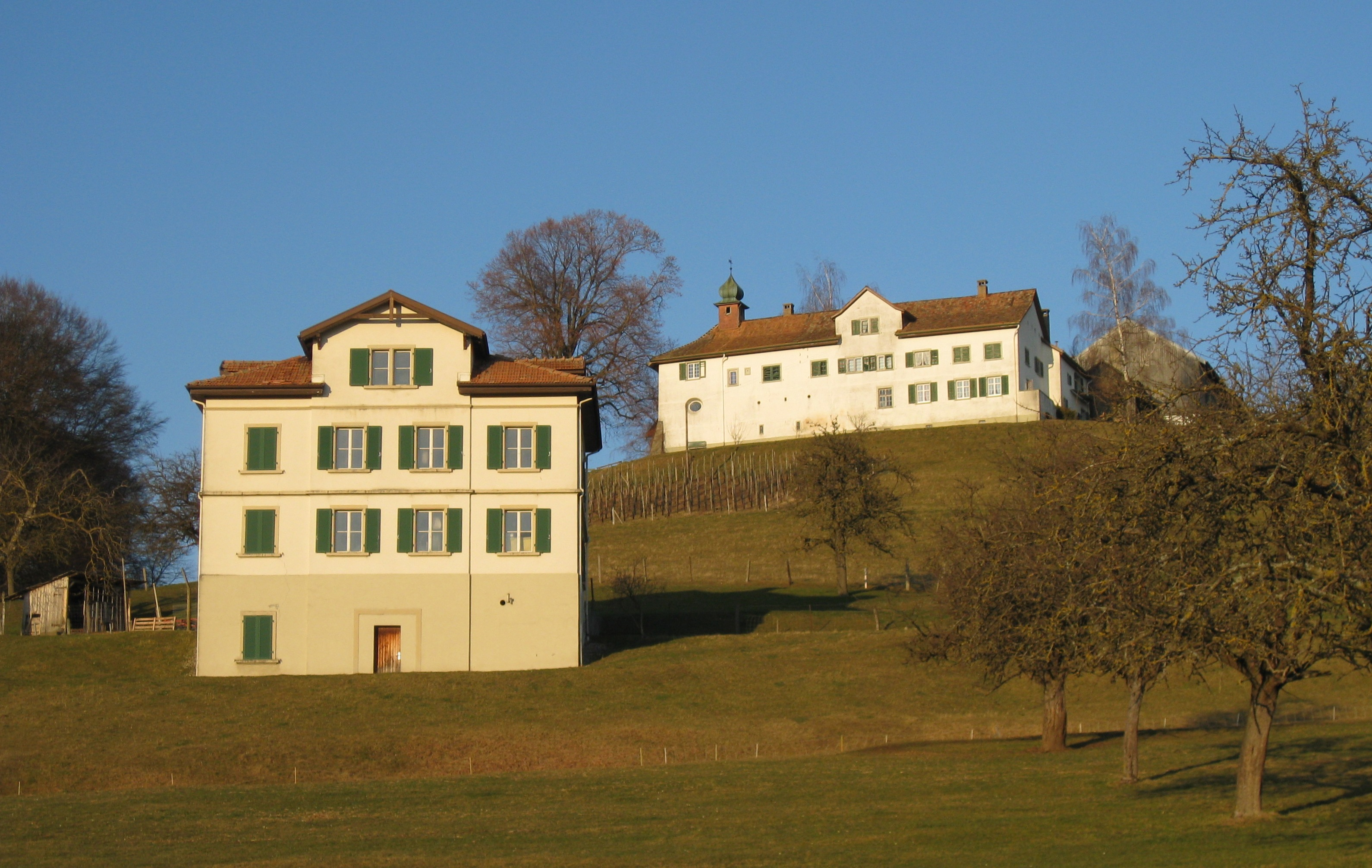 Das Schloss und das untere Schloss (Schlosshof) von Bettwiesen